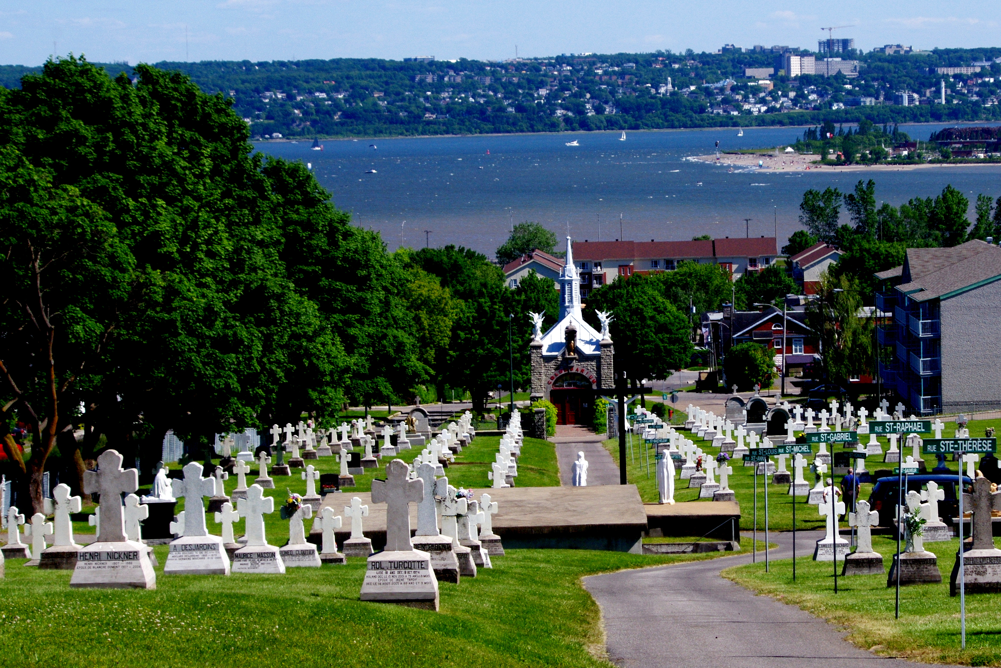 Le cimetière Giffard, dans l'arrondissement Beauport de la ville de Québec. En arrière-plan, la chapelle des Martyrs, construite en 1929 sur des plans de Gérard Morissette.